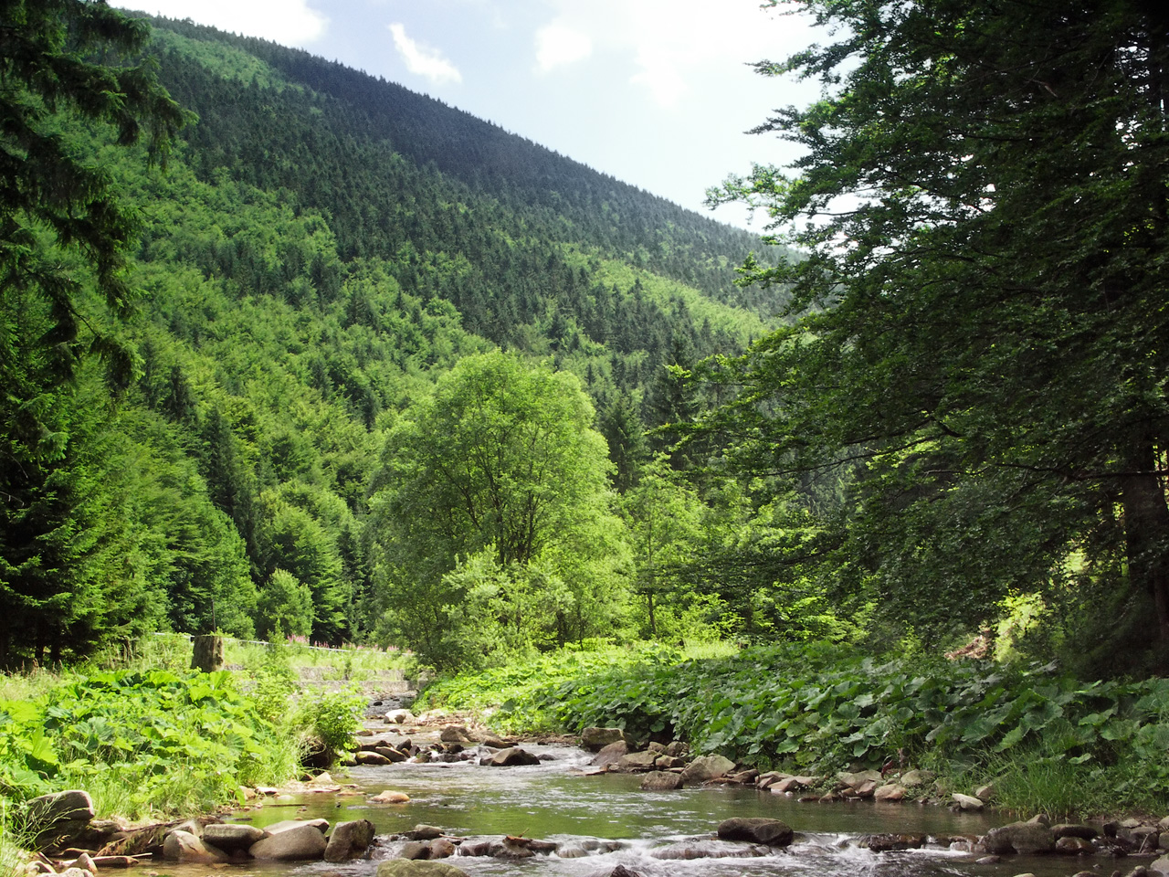 The Čeladenka under Smrk mountain